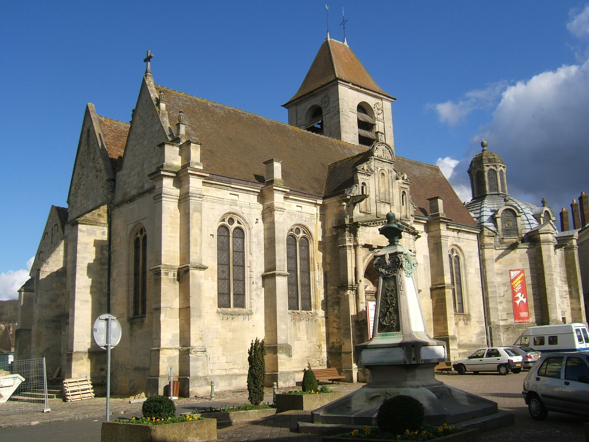 Église Saint-Rémi de Marines (Val-d'Oise) / Church Saint-Rémi of Marines (Val-d'Oise)